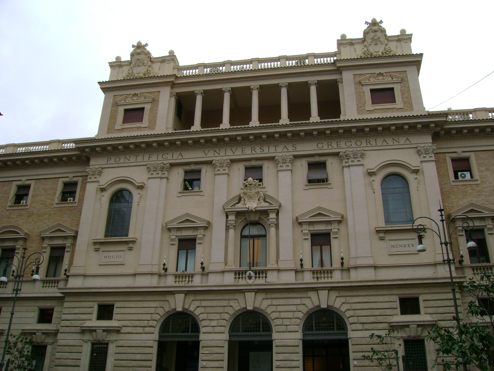 La facciata della Pontificia Universitas Gregoriana.